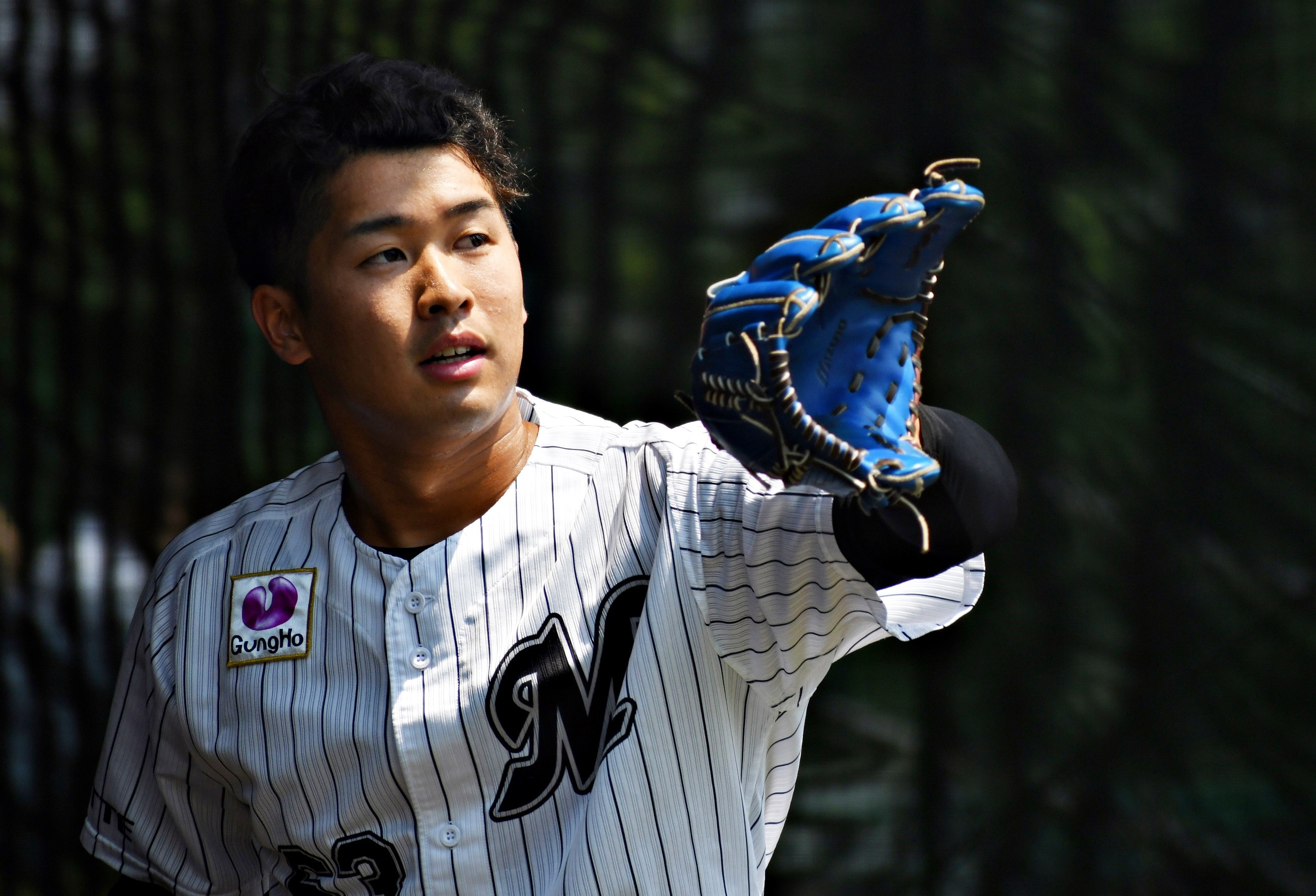 種市篤暉投手